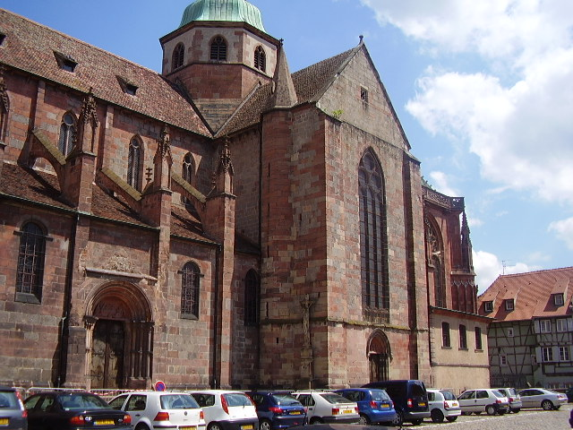 Sélestat, Saint-Georges